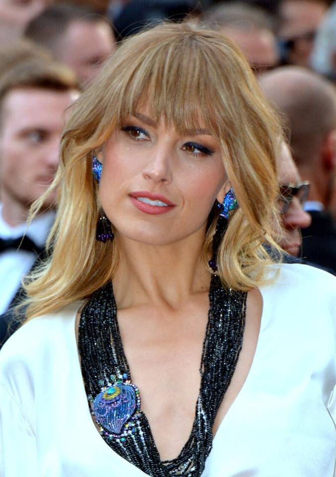 Petra Nemcova au festival de Cannes